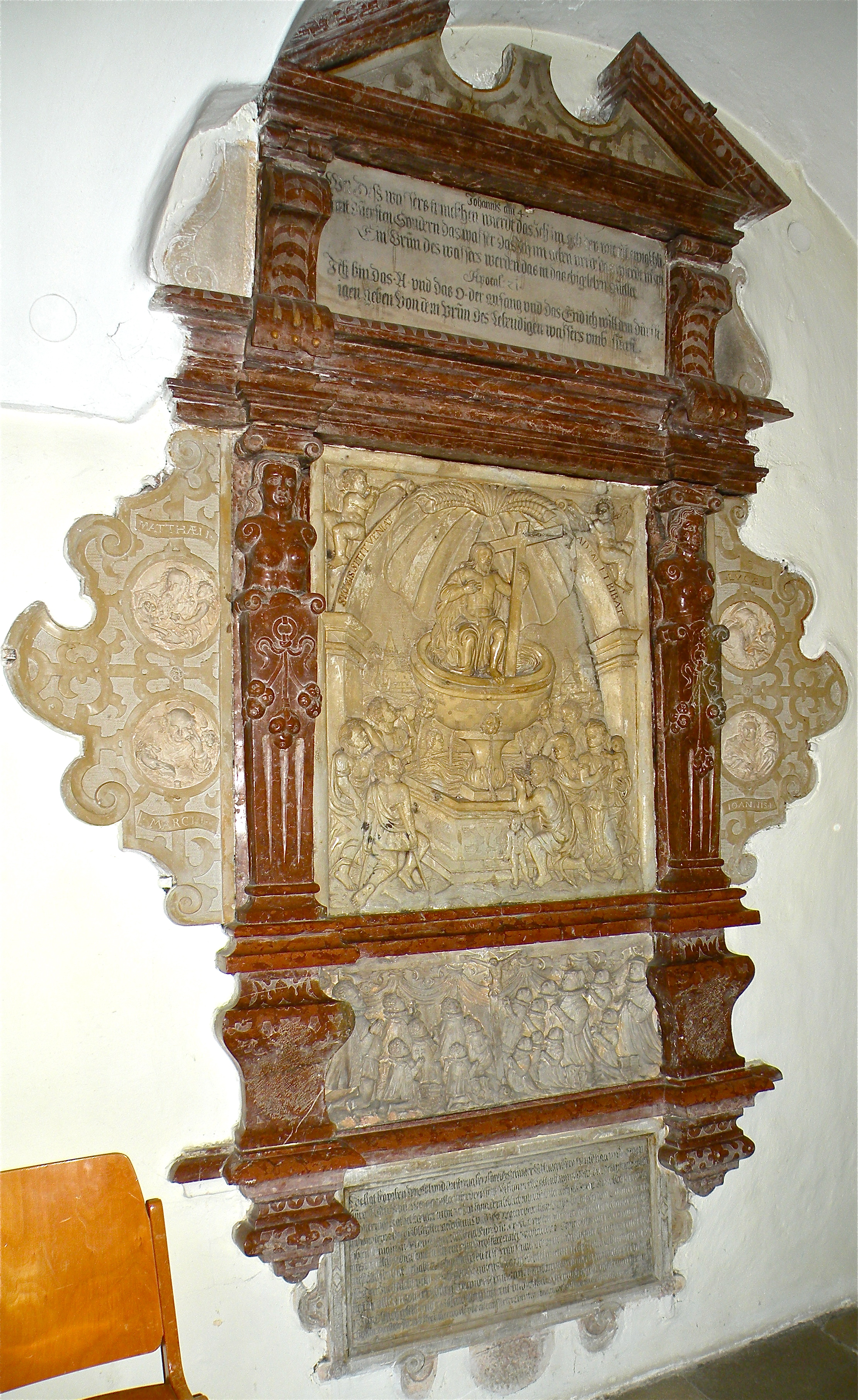 Epitaph des Lorenz Schütter in der Pfarrkirche Münzbach im Bezirk Perg in Oberösterreich vom Ende des 16. Jahrhunderts.